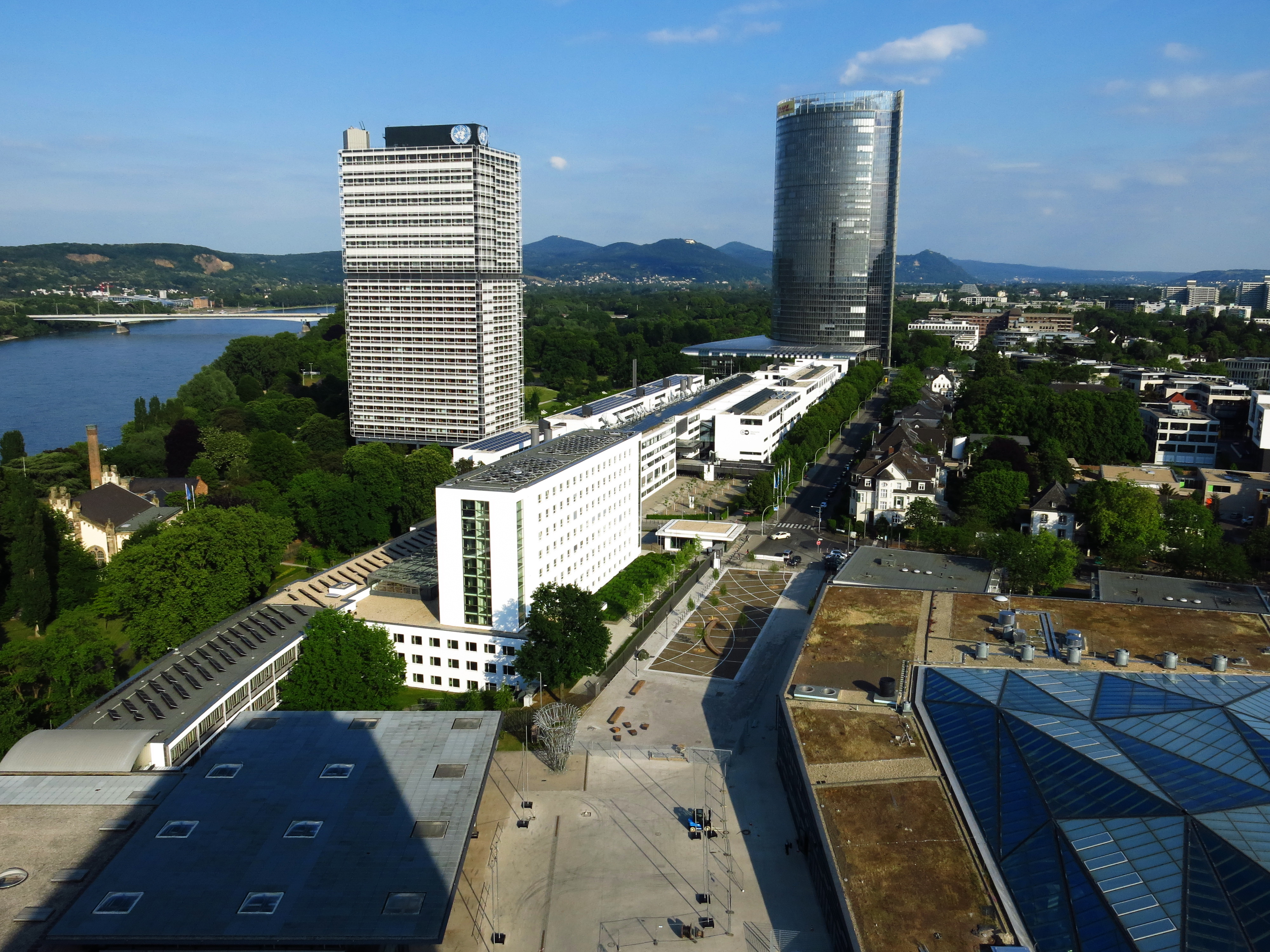 World Conference Center Bonn; Blick vom WCCB-Hotel in Richtung Süden.